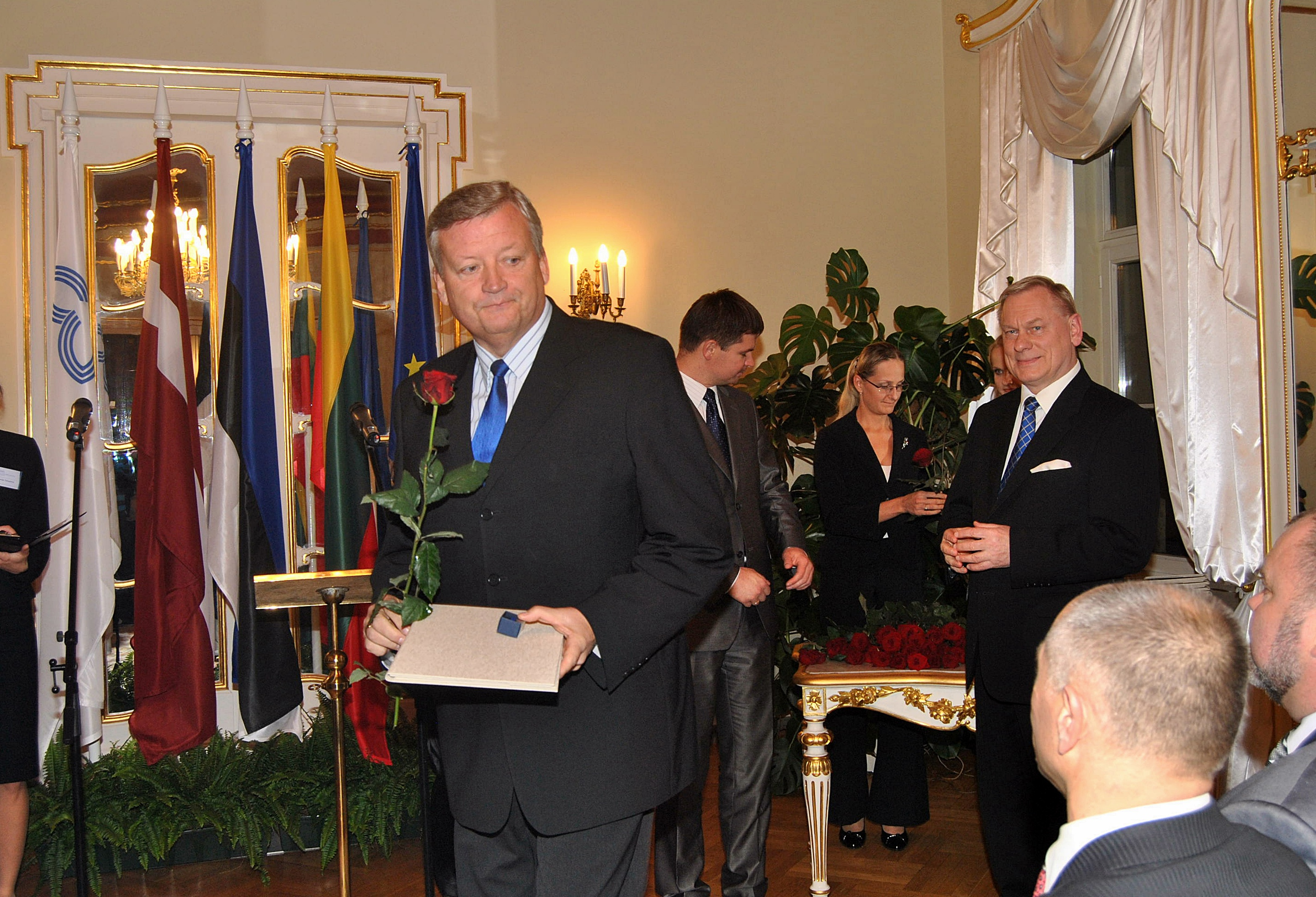 2010.gada 21.oktobris. Saeimas Baltajā zālē notiek Baltijas Asamblejas medaļu pasniegšanas ceremonija. Attēlā Igaunijas parlamenta deputāts Pēps Aru (Peep Aru). Foto: Saeima